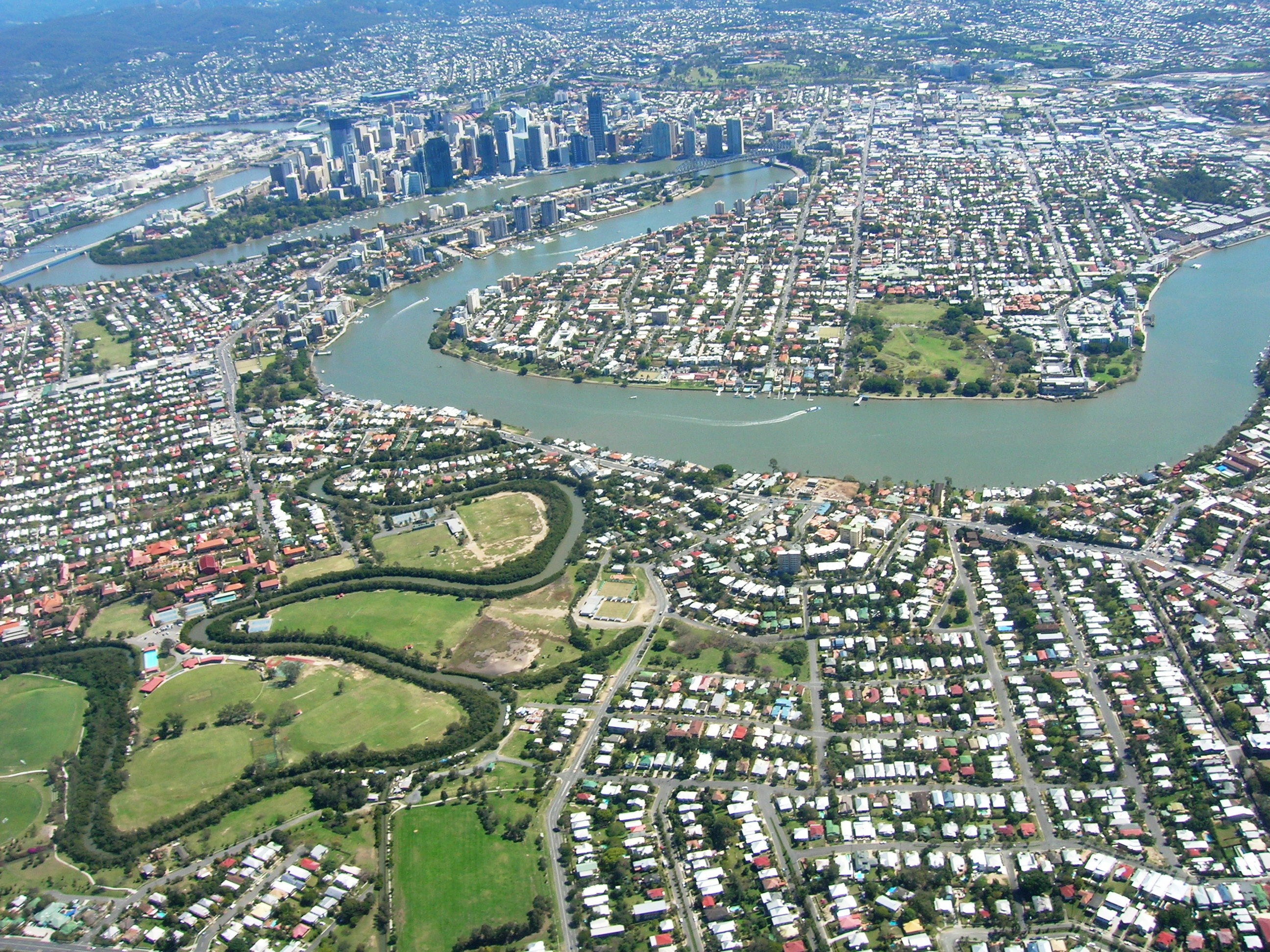 i090806 015